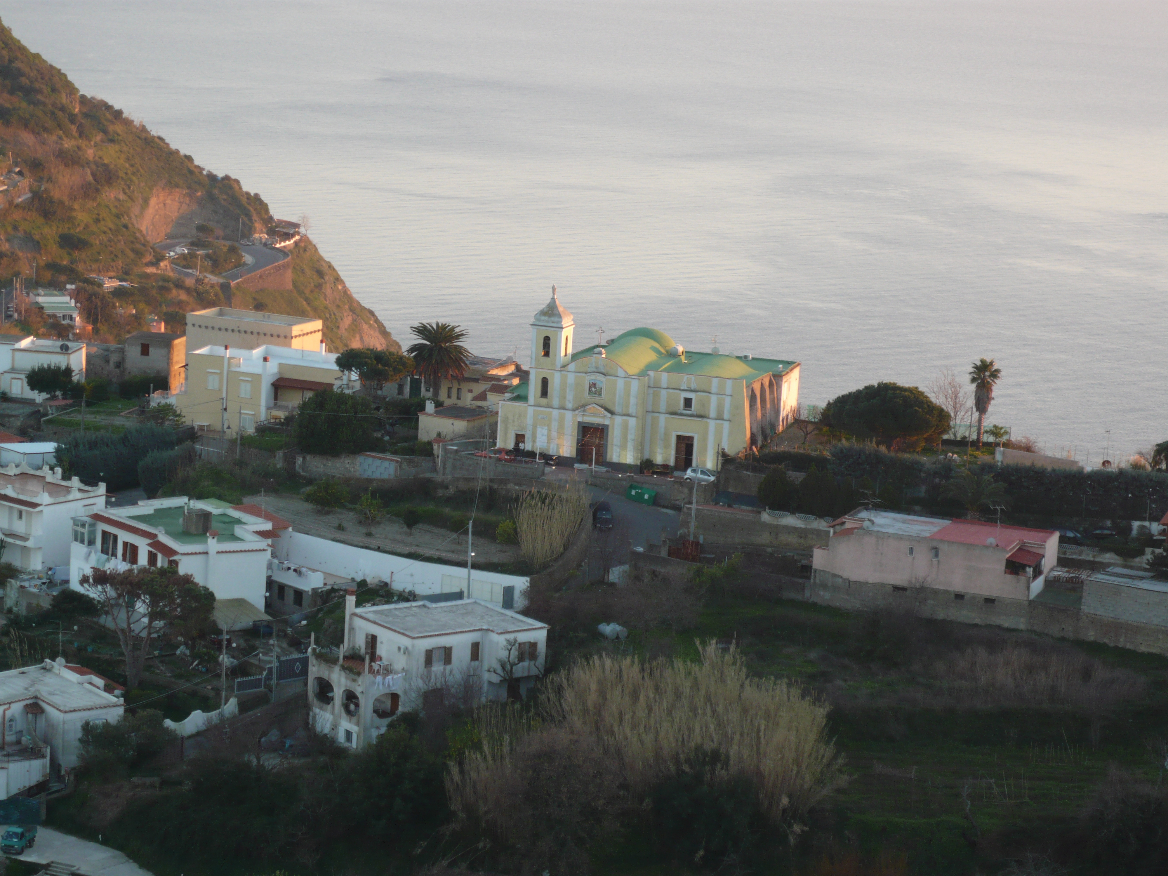 la Chiesa di San Giorgio a Testaccio, frazione del comune di Barano d'Ischia. Autore foto: Roberto De Martino